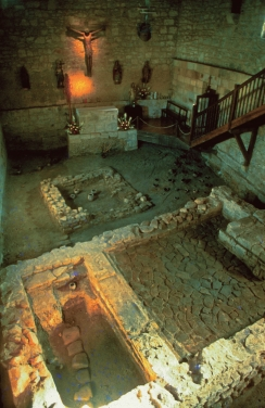 Indusketak Santa Elena ermitan (Irun, Gipuzkoa)